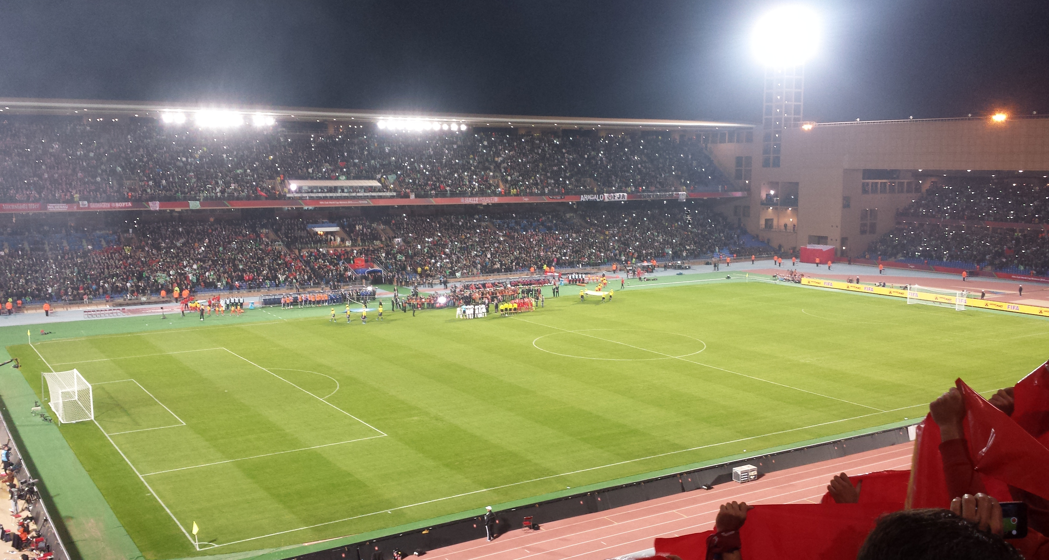 Vor dem Klub-WM Finale zwischen dem FC Bayern München und Raja Casablanca